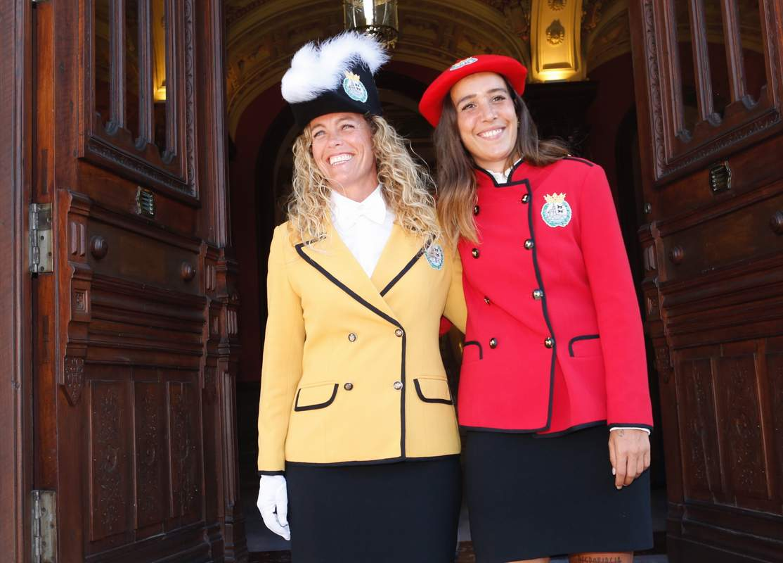 Bea Sever eta Itsasne Núñez, 2019ko Aste Nagusiko pregoilari eta txuinera Bilbon.